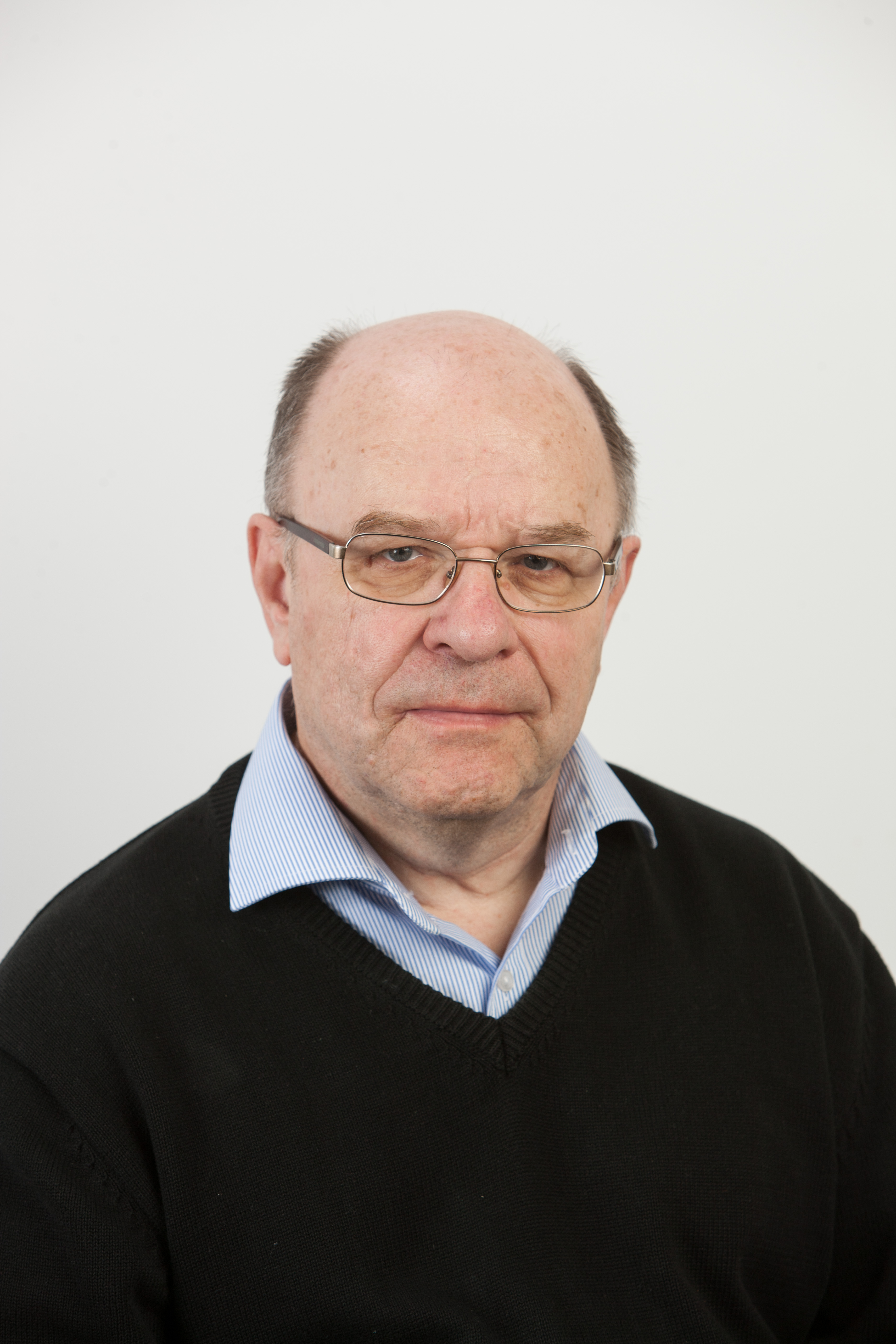 TÜ immunoloogia õppetooli immunoloogia professor, akadeemik Raivo Uibo.